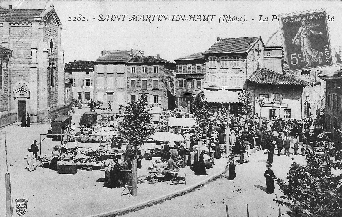 Saint-Martin-en-haut (Rhône).- La Place du Marché